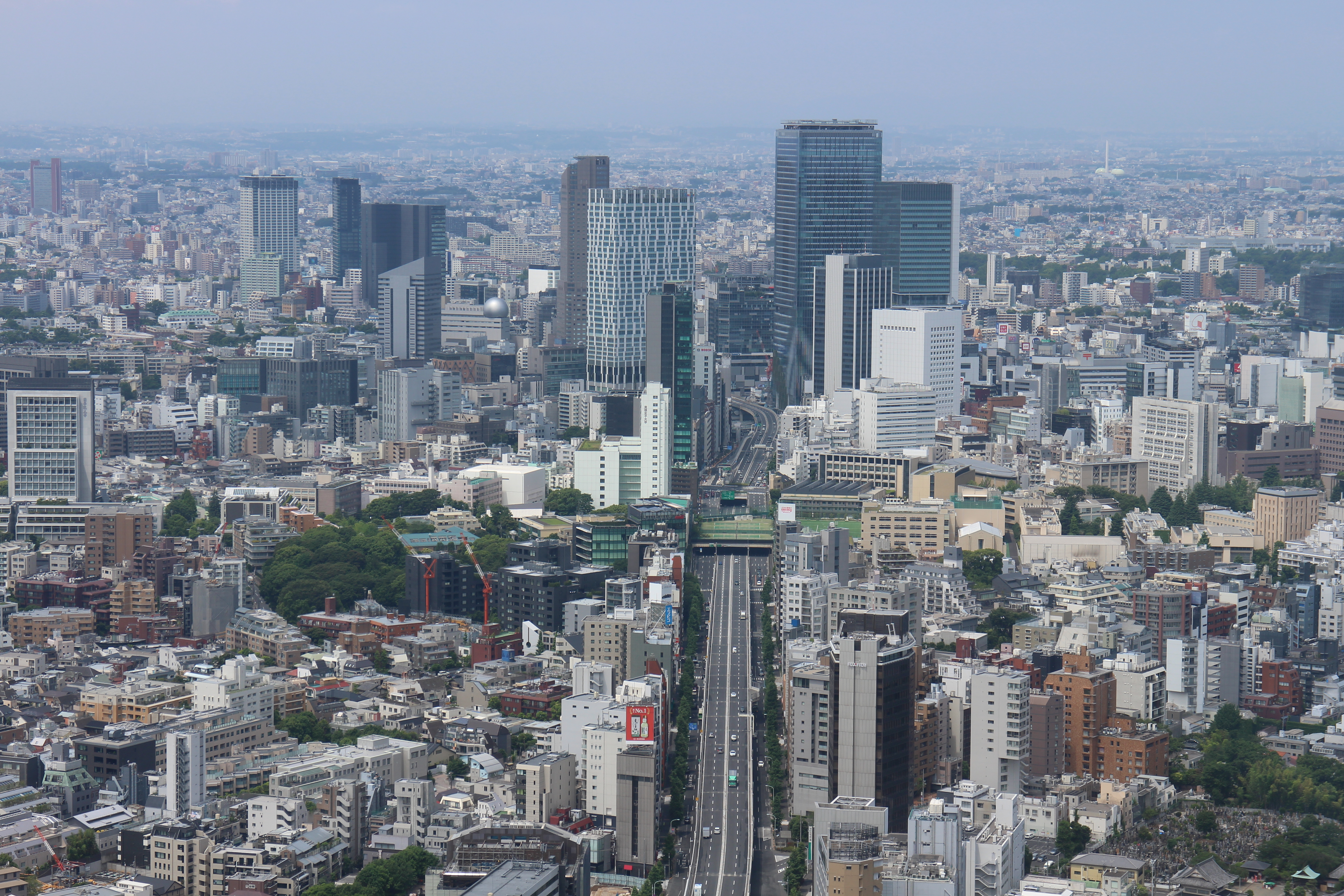 六本木ヒルズからみた渋谷の高層ビル